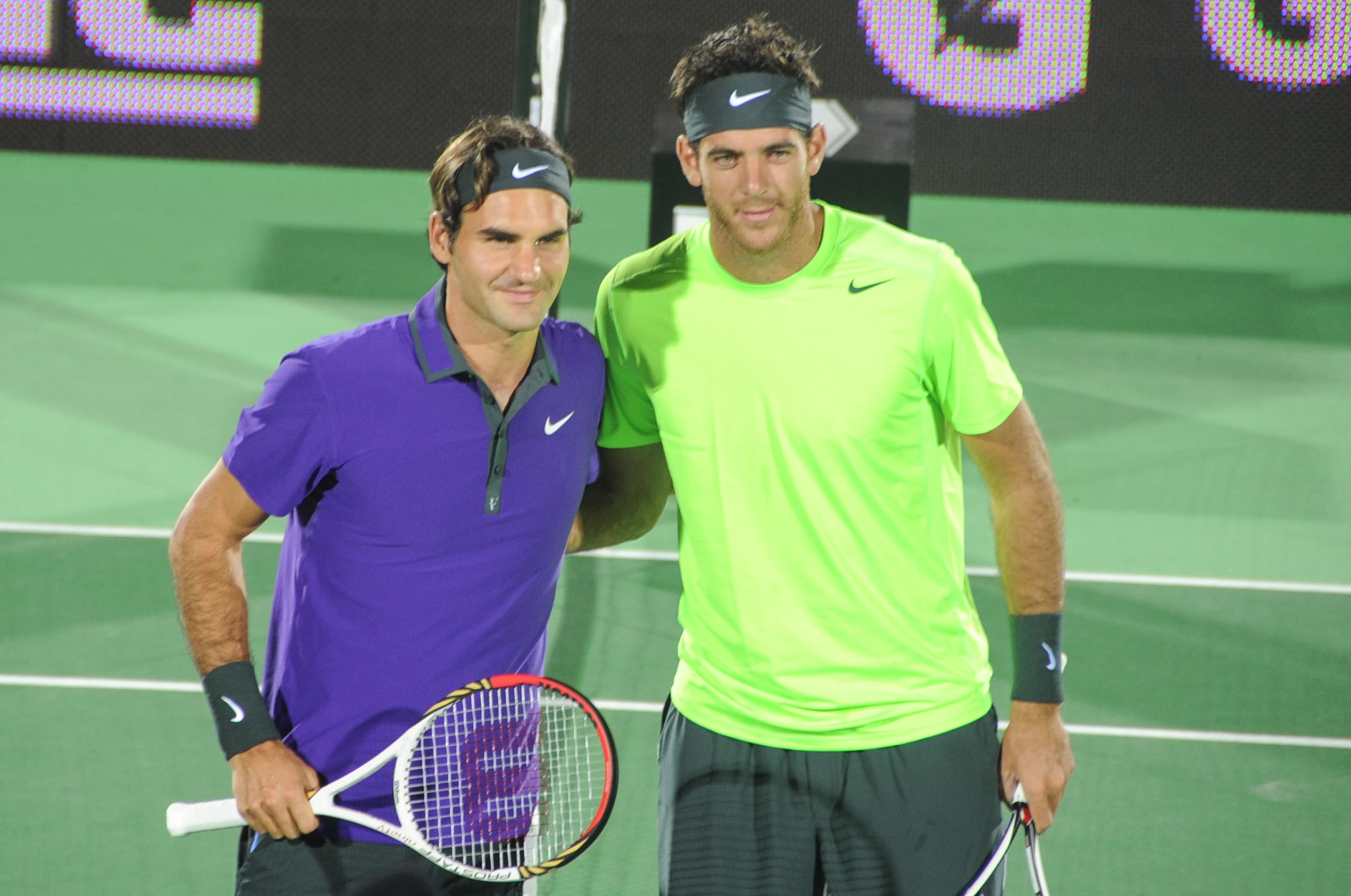 Roger Federer Vs. Juan Martín Del Potro en Tigre, Buenos Aires, Argentina